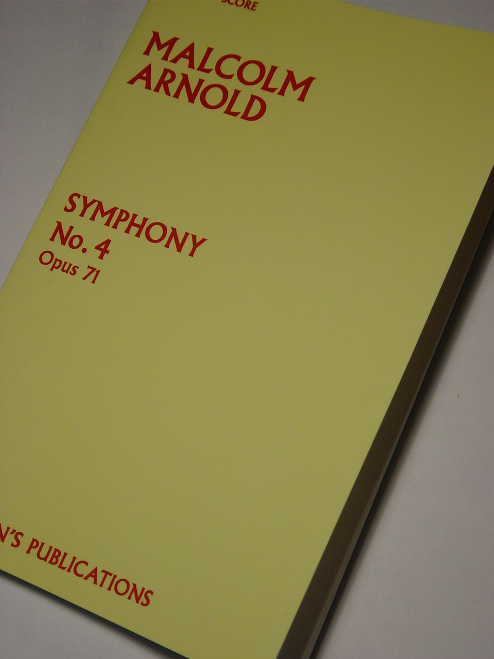 Portada de la edición de bolsillo de la Sinfonía nº4 de Malcolm Arnold, editada por Paterson's Publications.